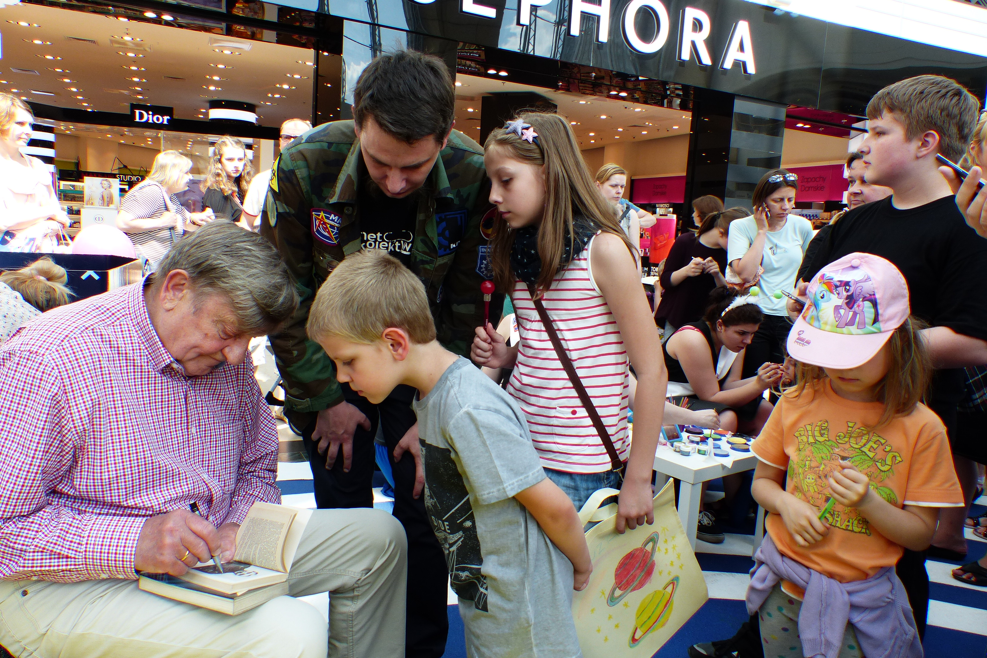 Mirosław Hermaszewski, pierwszy polski kosmonauta, na spotkaniu w Warszawie, maj 2016